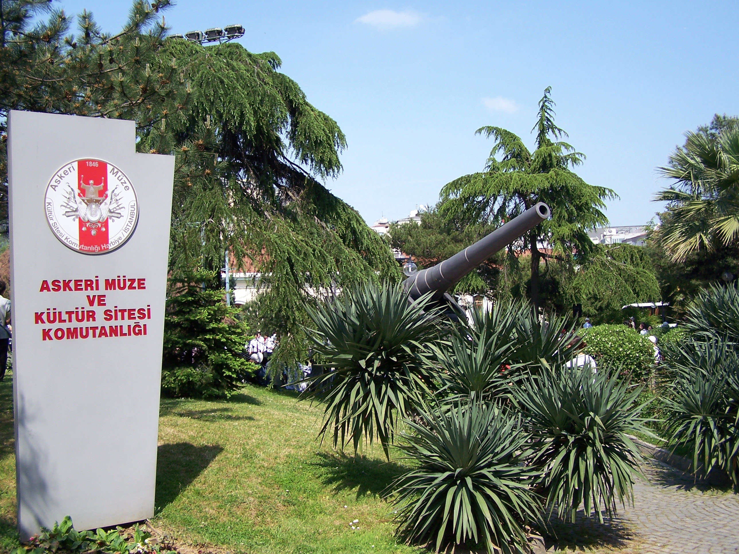 Askeri Müzesi (Military Museum) in Şişli, İstanbul, Turkey